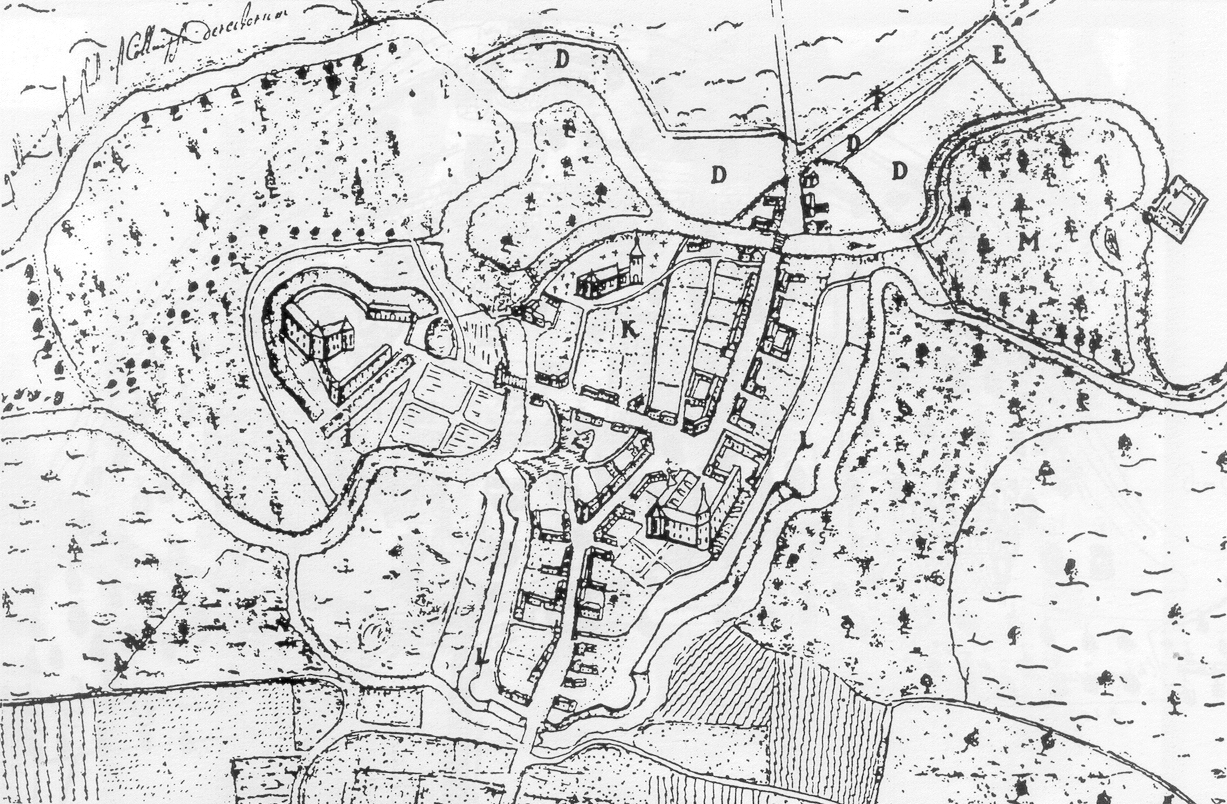 Karte Grevenbroichs des Architekten Rees von 1771